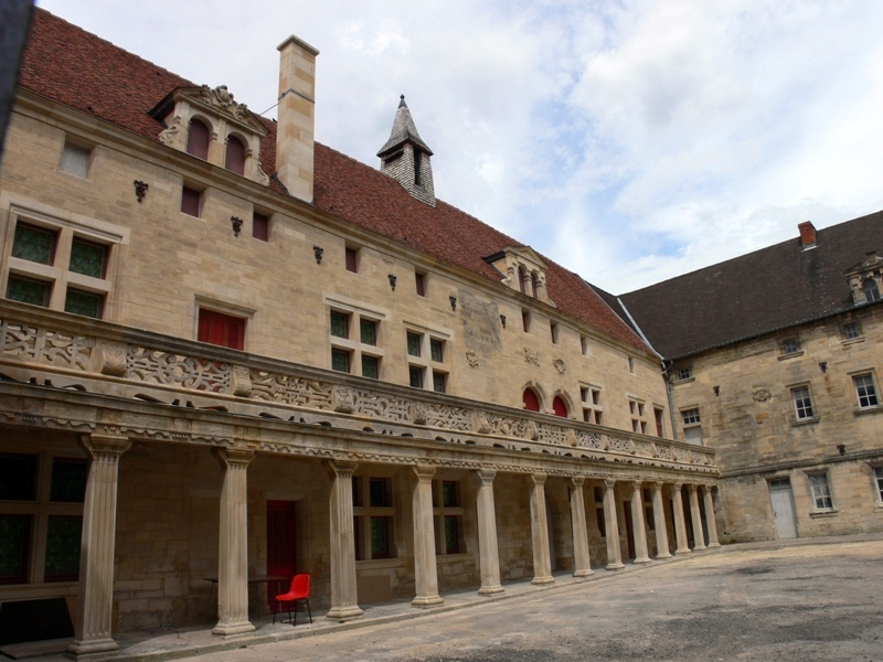 Façade et galerie intérieure du Collèges Gilles-de-Trèves à Bar-le-Duc, Lorraine, France